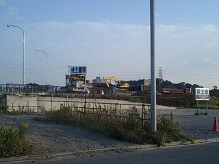 残土置場（朝霞市大字台）